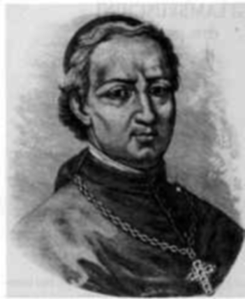 Luigi Emmanuele Nicolo Lambruschini (1776-1854) Kardinal